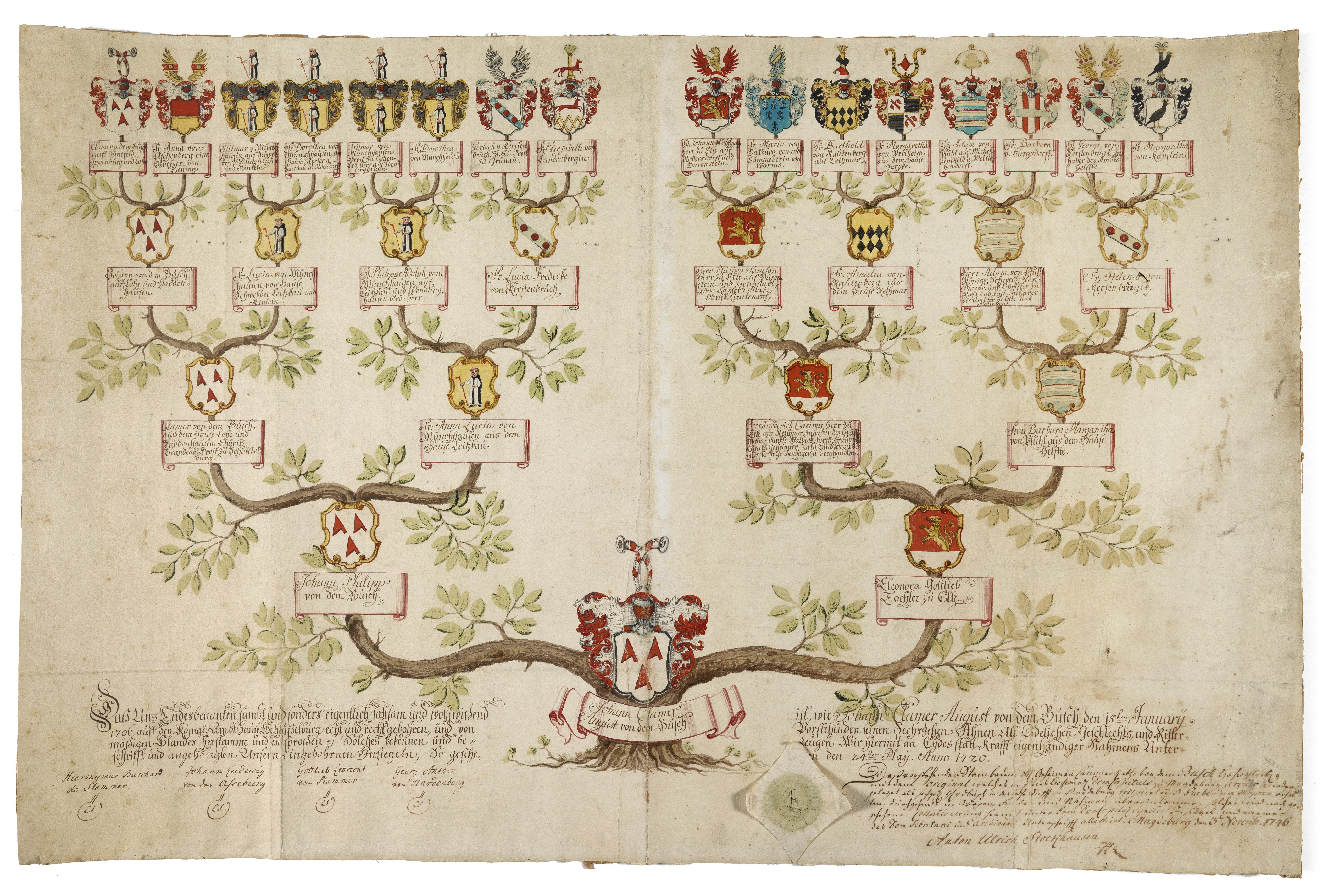 Ahnenprobe des Johann Clamer August von dem Busche (Amtshaus Schlüsselburg, 15. 1. 1706), kollationierte Abschrift, Magdeburg, 3. 11. 1746, Aquarell- und Deckfarben auf Papier, 61 x 93 cm, enthält u. a. die Geschlechter Busche auf Hünefeld, Aschenbach, Münchhausen auf Schwebber, Münchhausen a. d. H. Apelern, Münchhausen auf Wendlinghausen, Münchhausen, Kerssenbrock, Landsberg, Eltz auf Rodersdorf, Dalberg gen. Kämmerer v. Worms, Rautenberg auf Rethmar, Vestheim, Pfühl, Burgsdorff, Kerssenbrock und Kanstein.